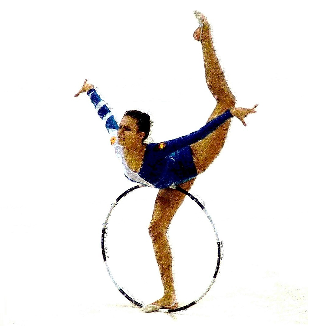 La gimnasta española Carmen Acedo durante el ejercicio de aro en el Campeonato Mundial de Gimnasia Rítmica de 1993, celebrado en Alicante.